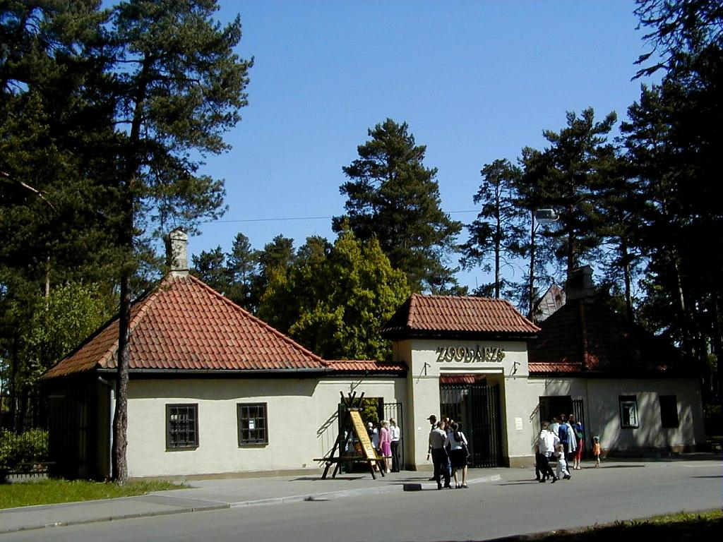 Rīgas zoodārza vārti 2002-05-12